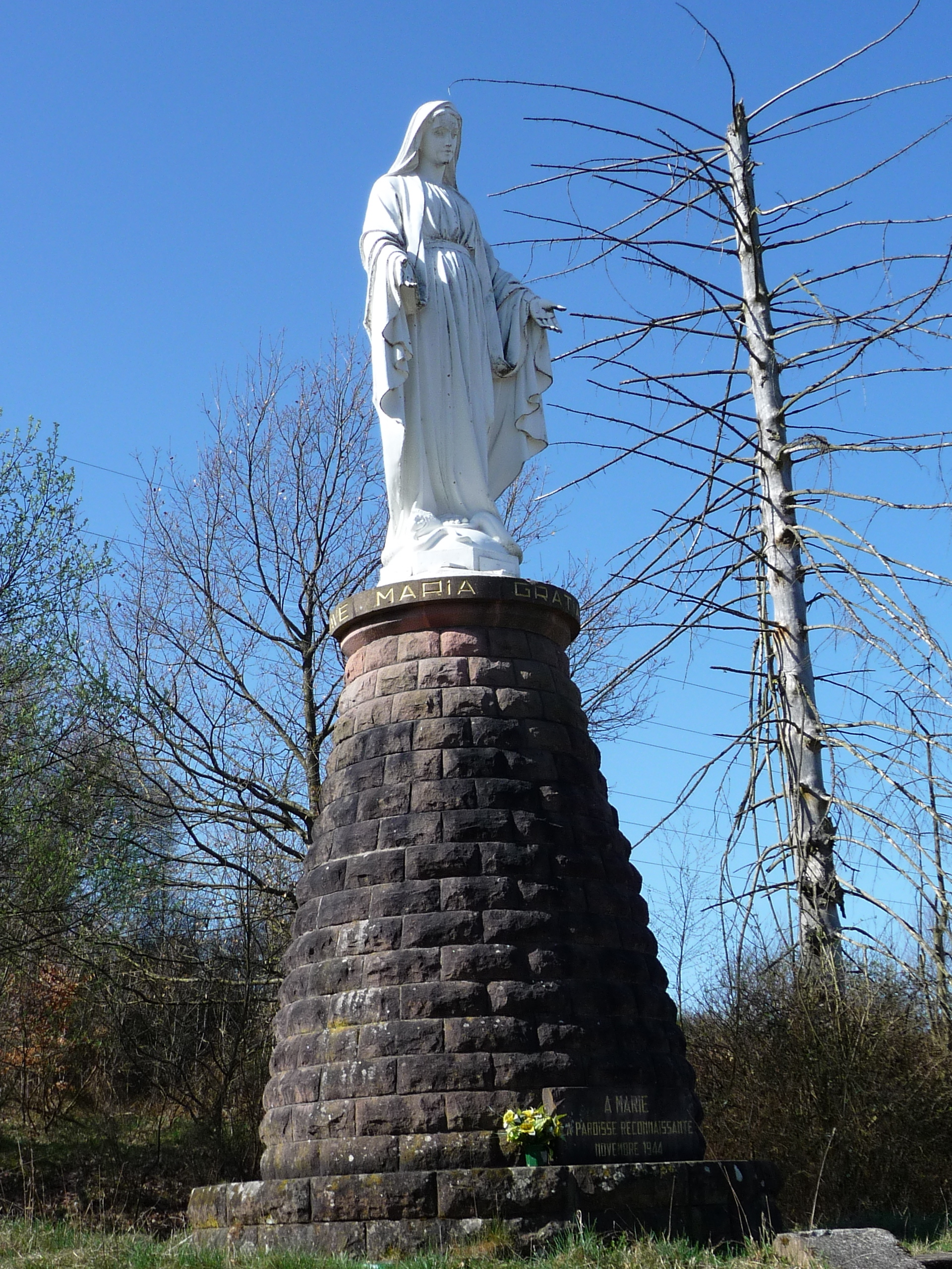 statue de la Vierge de la Libération de Raon-l'Étape 88110